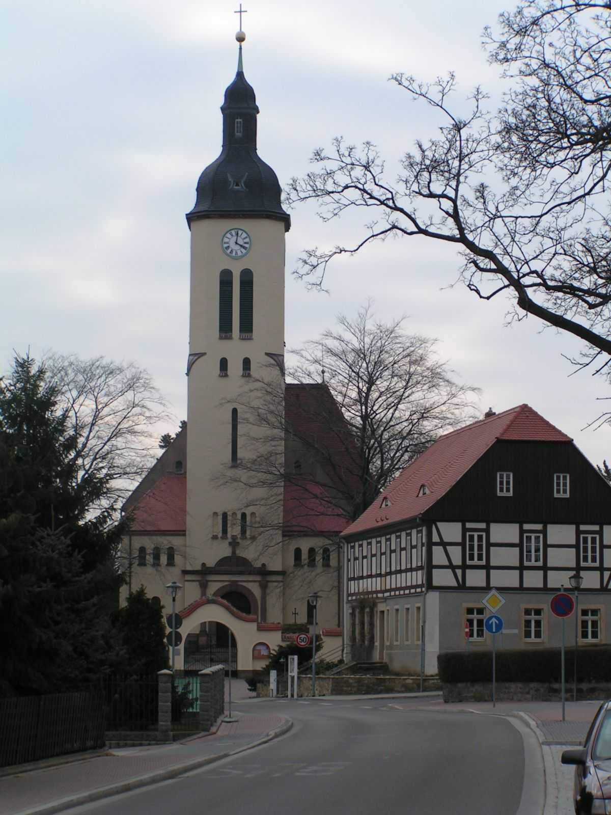 Pesterwitz